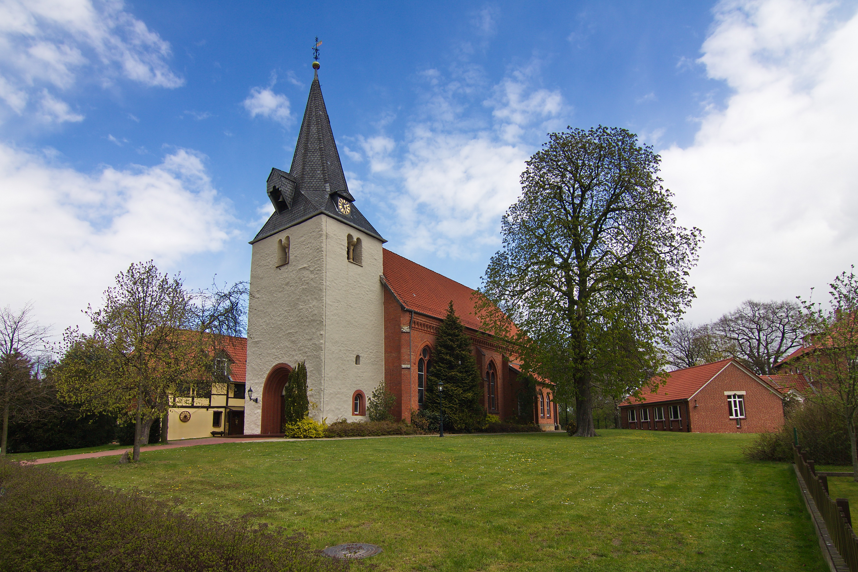 St.Johannis-Kirche in Dungelbeck (Peine), Niedersachsen, Deutschland.